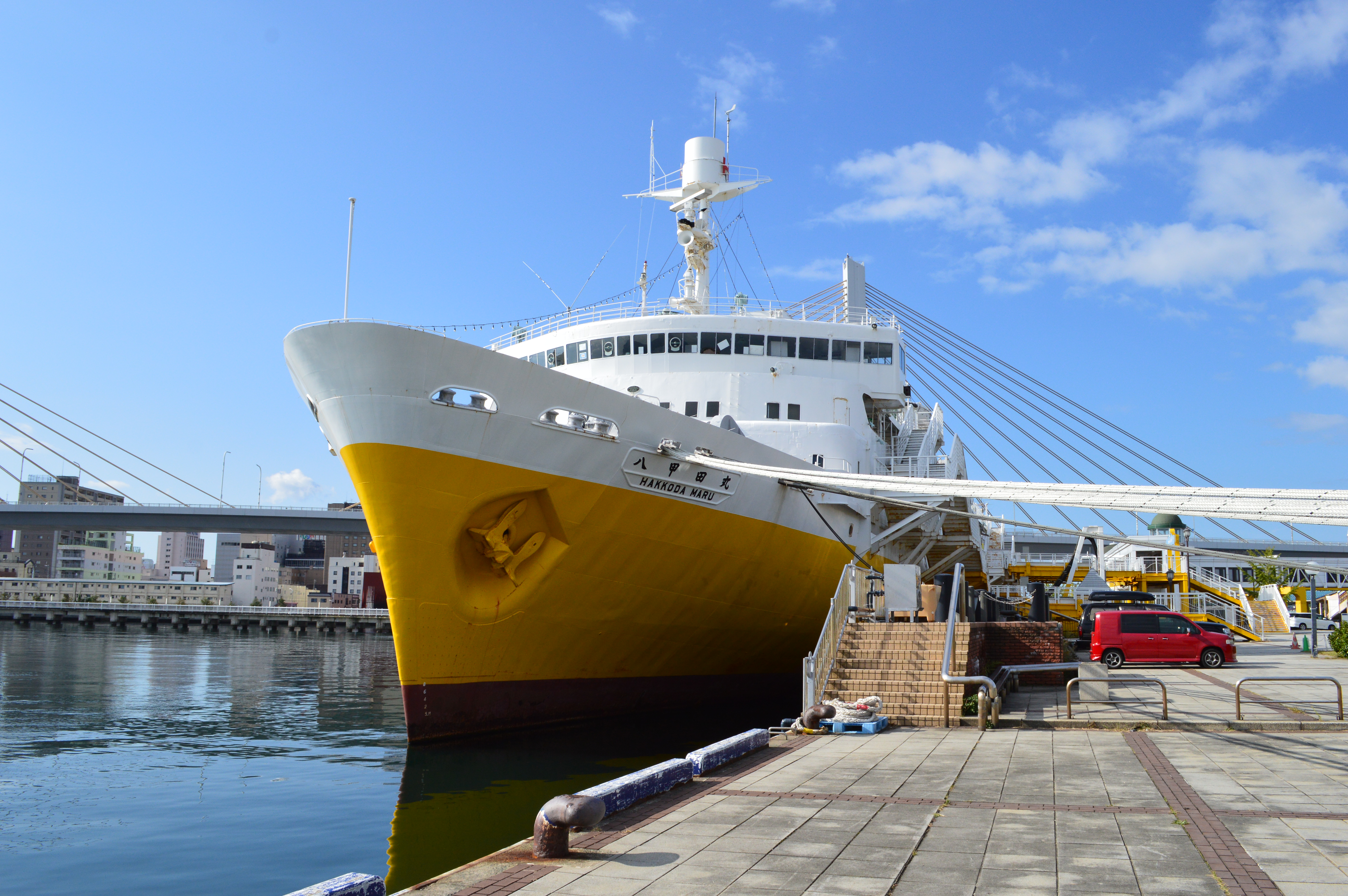 八甲田丸 全景